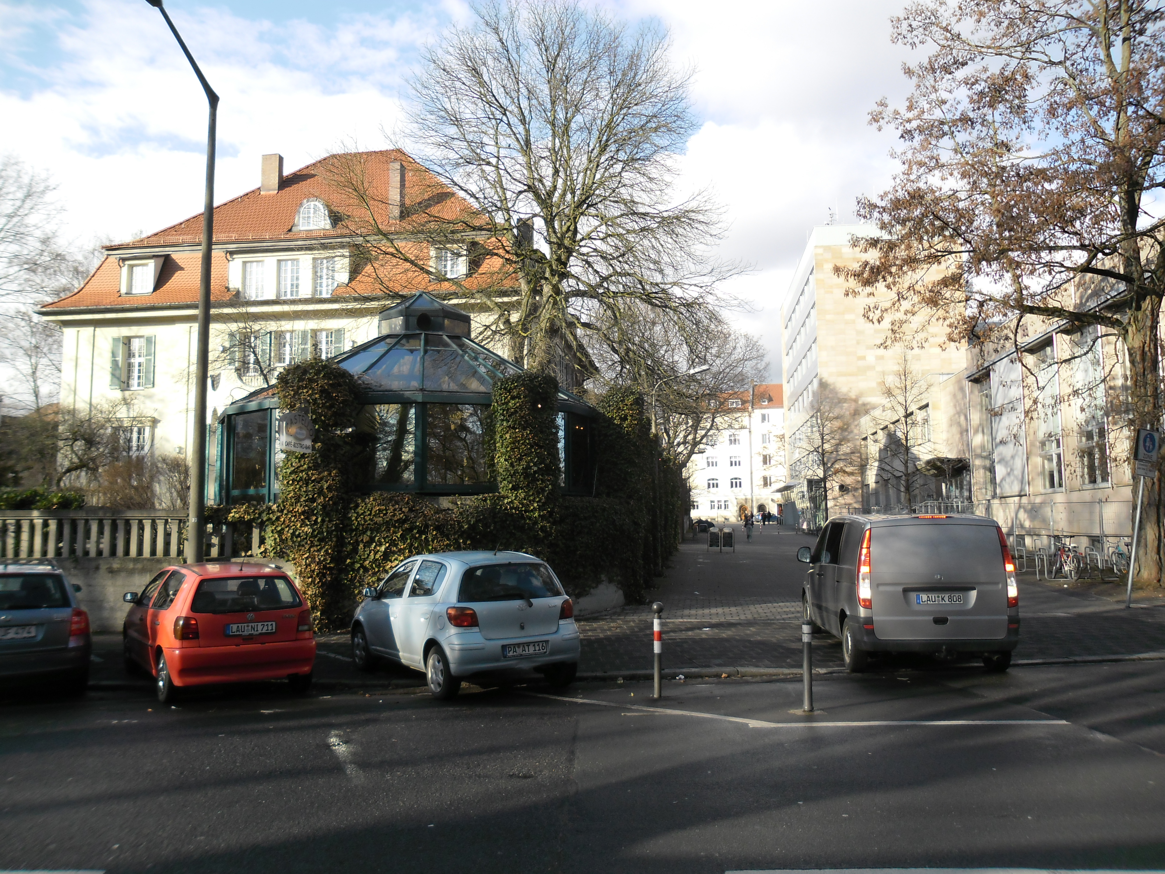 Gebäude des Standortes Kesslerplatz (KA- und KV-Gebäude) der Technischen Hochschule Nürnberg an der Liebigstraße im Stadtbezirk Wöhrd